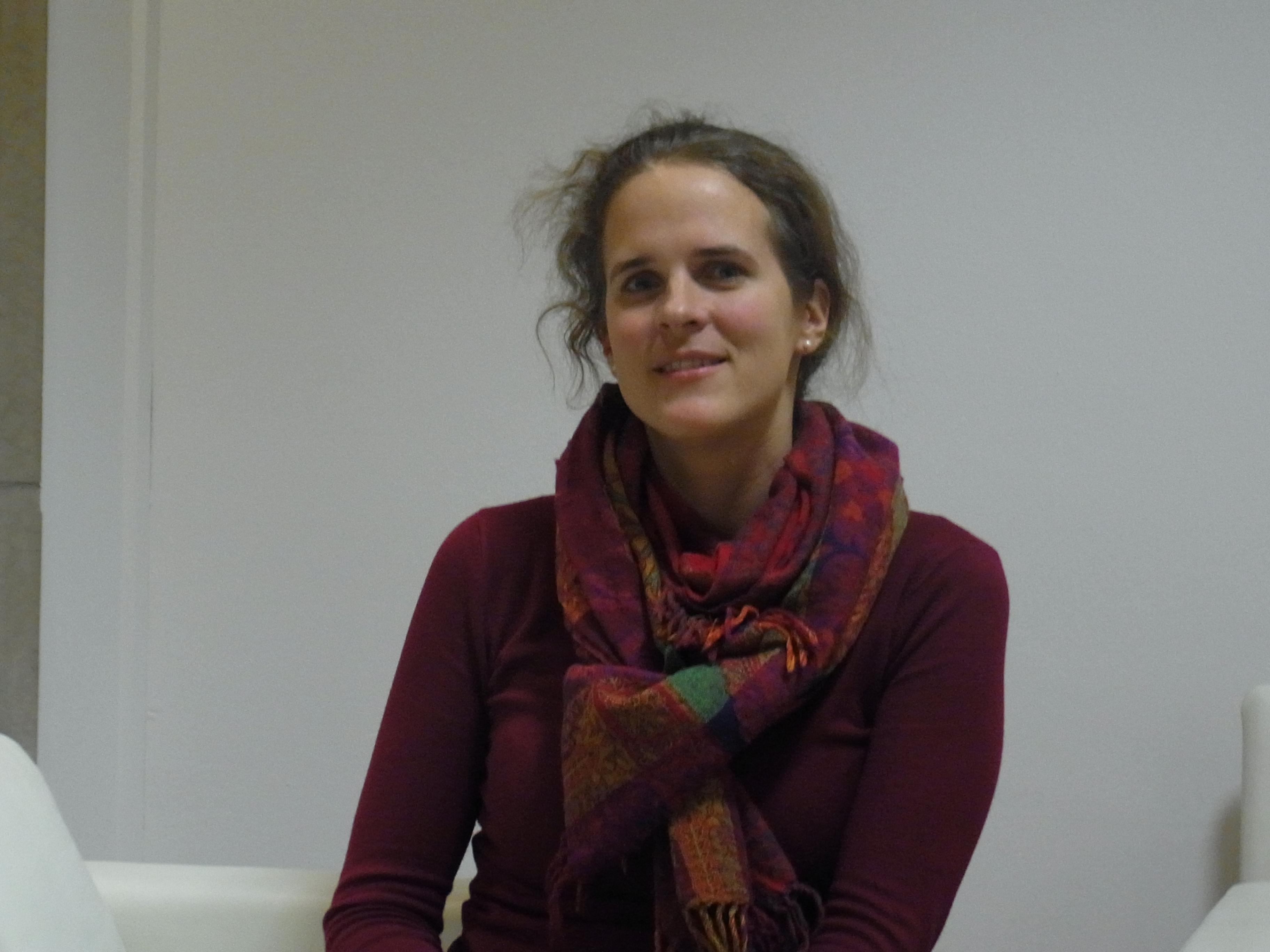 Nora Schmid - Leitende Dramaturgin, Semperoper Dresden